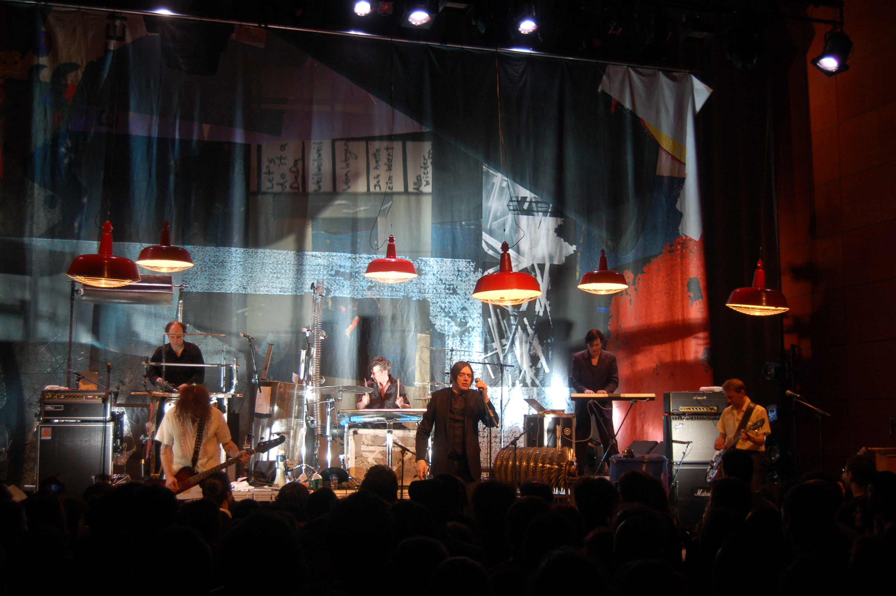 concerto da Einstürzende Neubauten